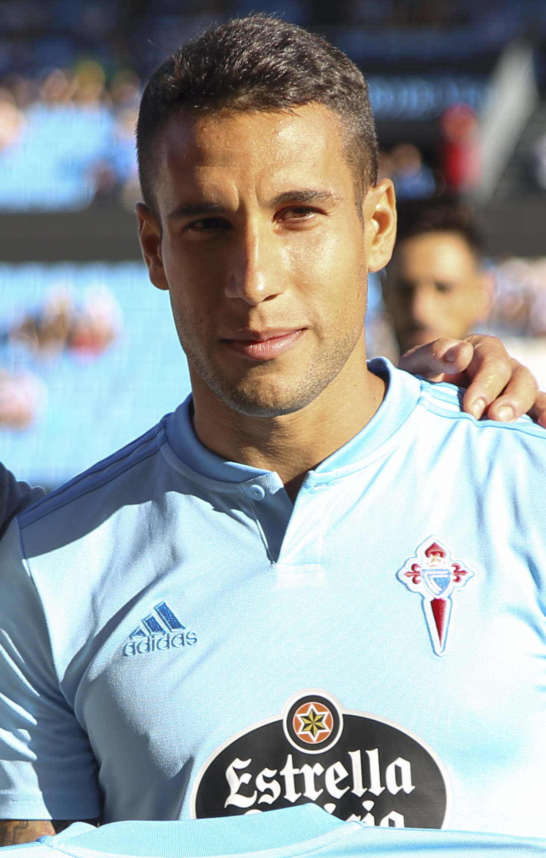 Presentación RC Celta - Temporada 18/19